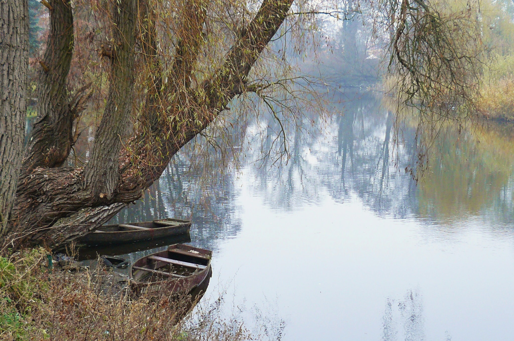 Obra river in Zbąszyń.